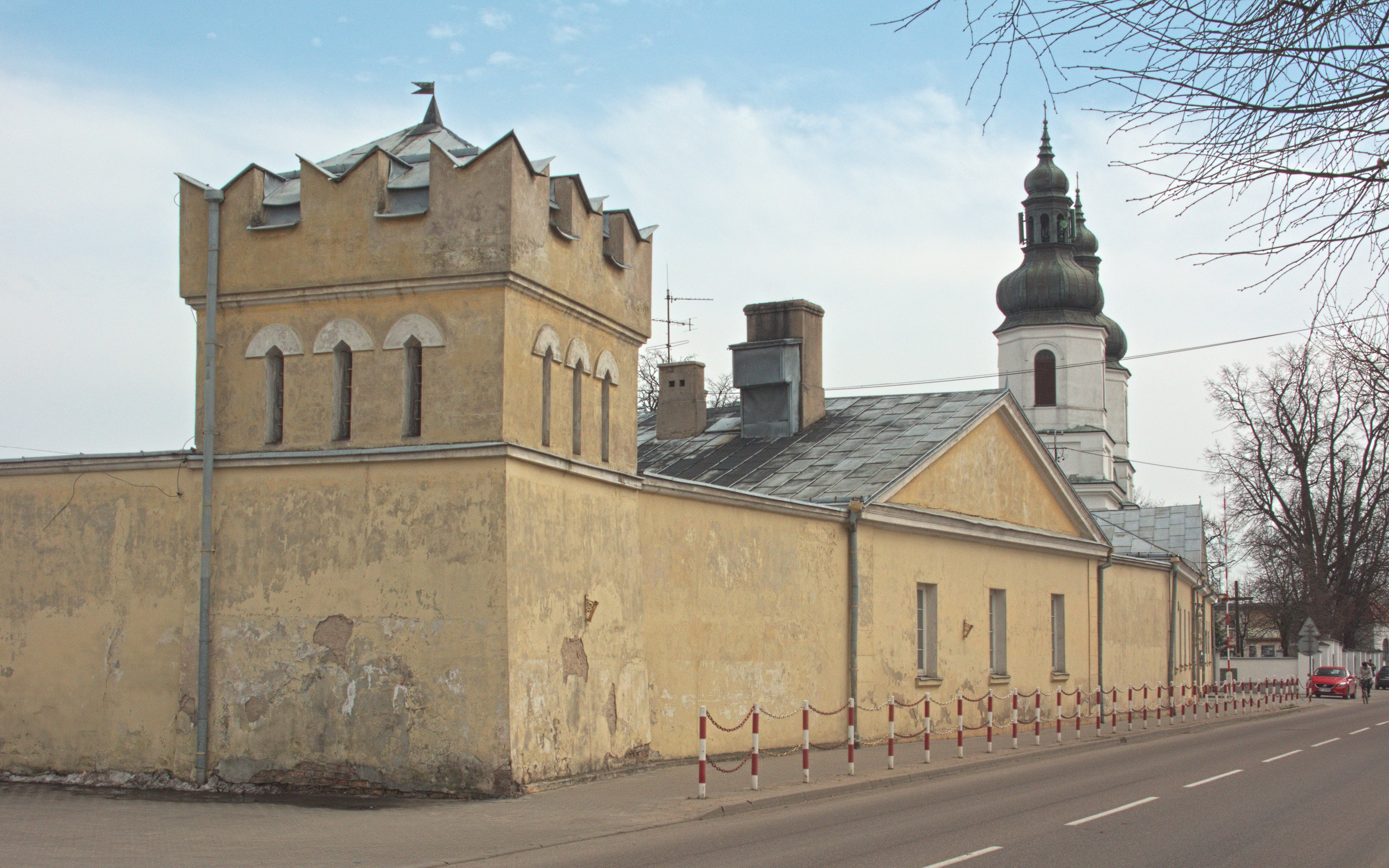 Dawny zespół klasztorny karmelitów w Bielsku Podlaskim.